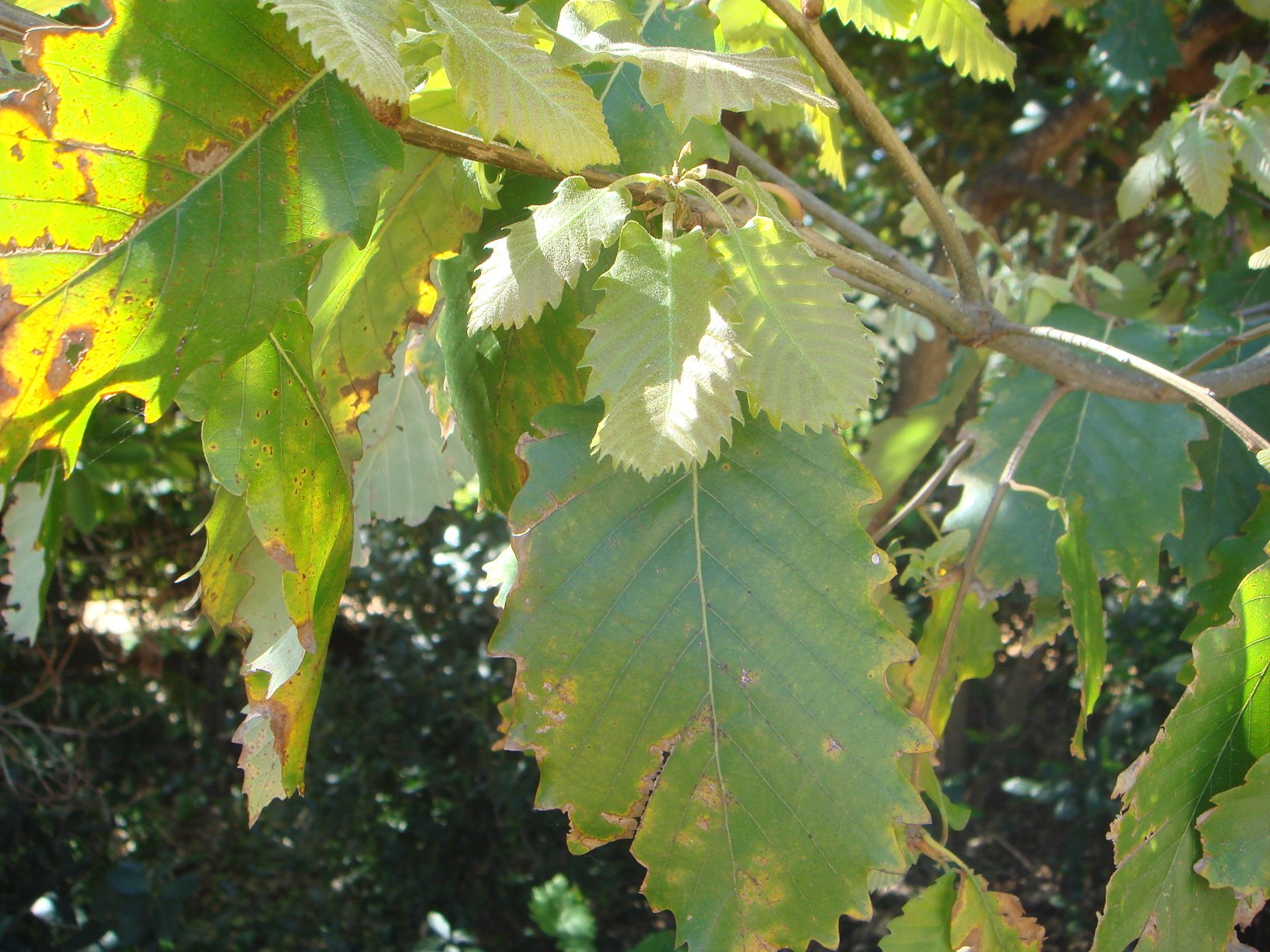 Quercus canariensis Jardín Botánico de San Fernando, Cádiz, España